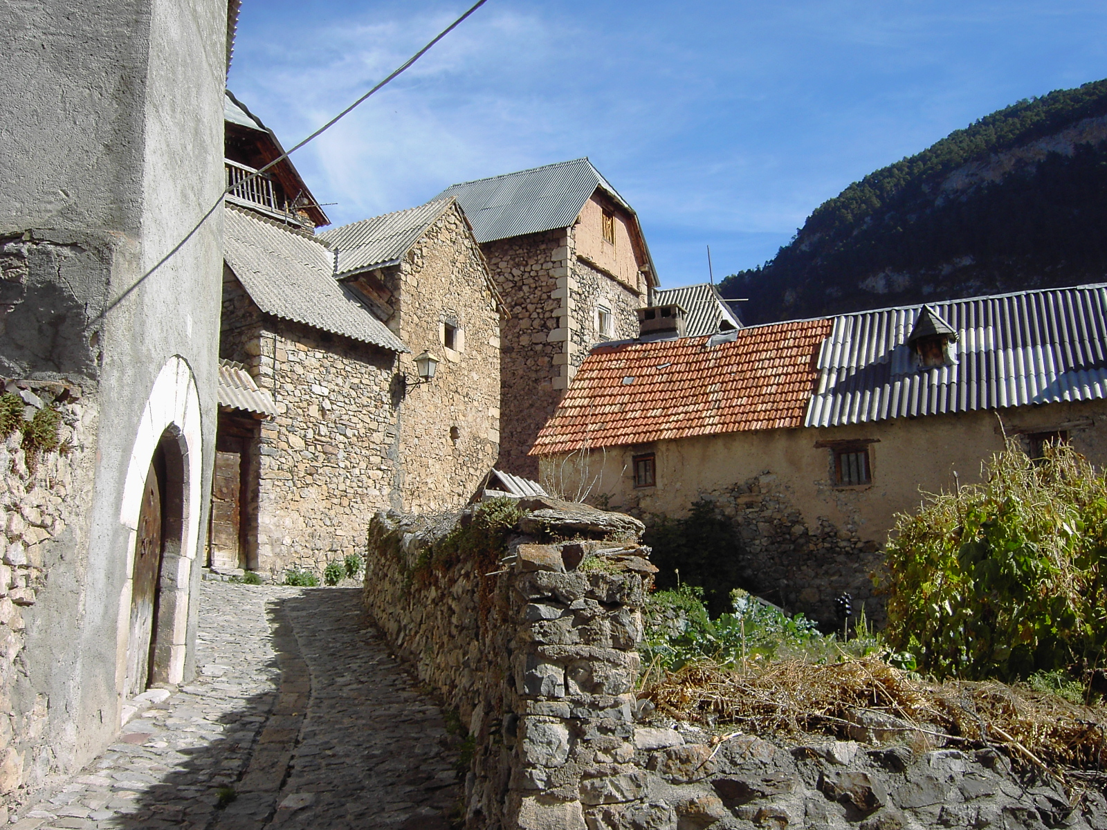 El interior del núcleo de Serveto, en La Comuna.